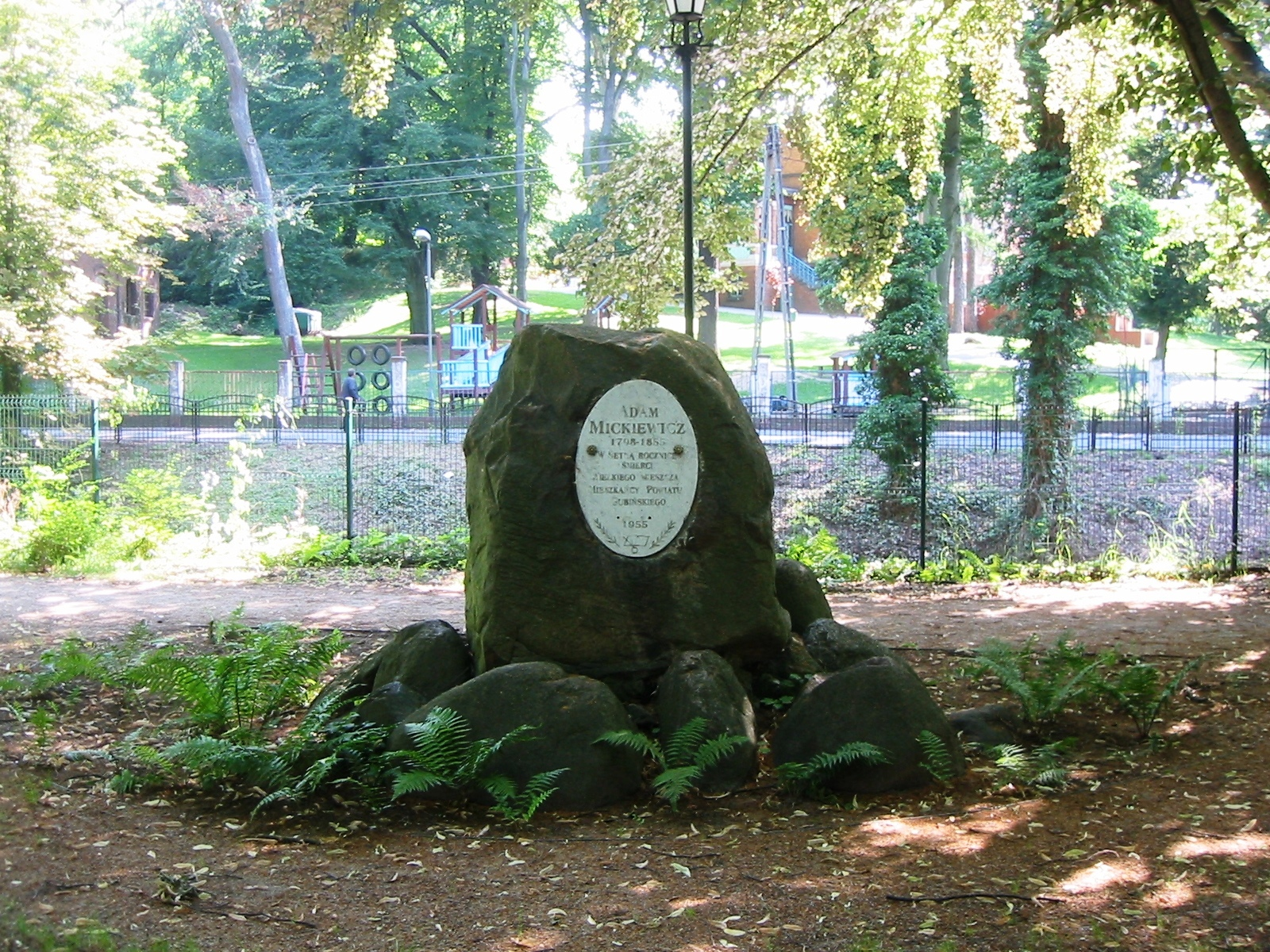 Gedenkstein für den polnischen Dichter Mickiewicz im gleichnamigen Park in Gubin, Polen